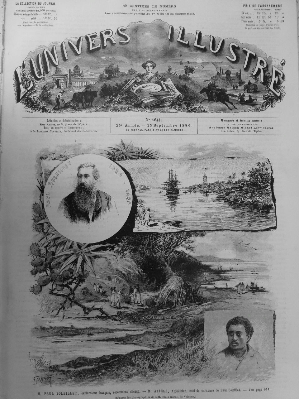 Page couverture de l'édition du 25 septembre 1886 de l'hebdomadaire français L'Univers illustré consacrée à l'explorateur et promoteur colonial Paul Soleillet mort peu de temps auparavant à Aden.